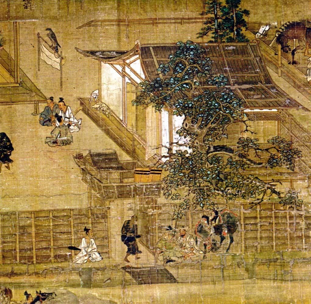 The home of a Gokenin (description from source: Une part de la peinture en rouleau "Ippen shonin e" (13eme siecle))